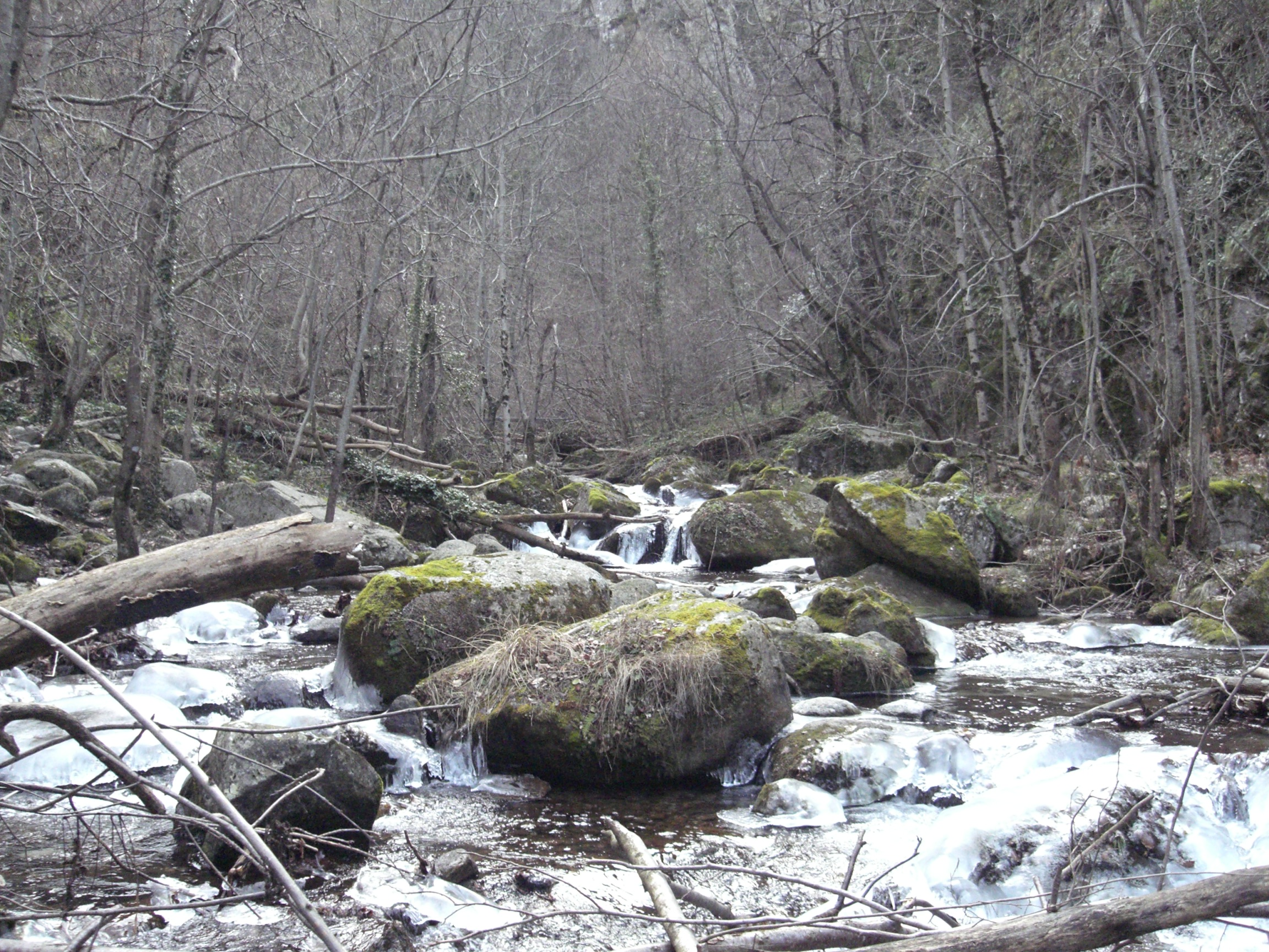 Torrent de Carançà (afluent del Tet) a les gorges de Carançà.